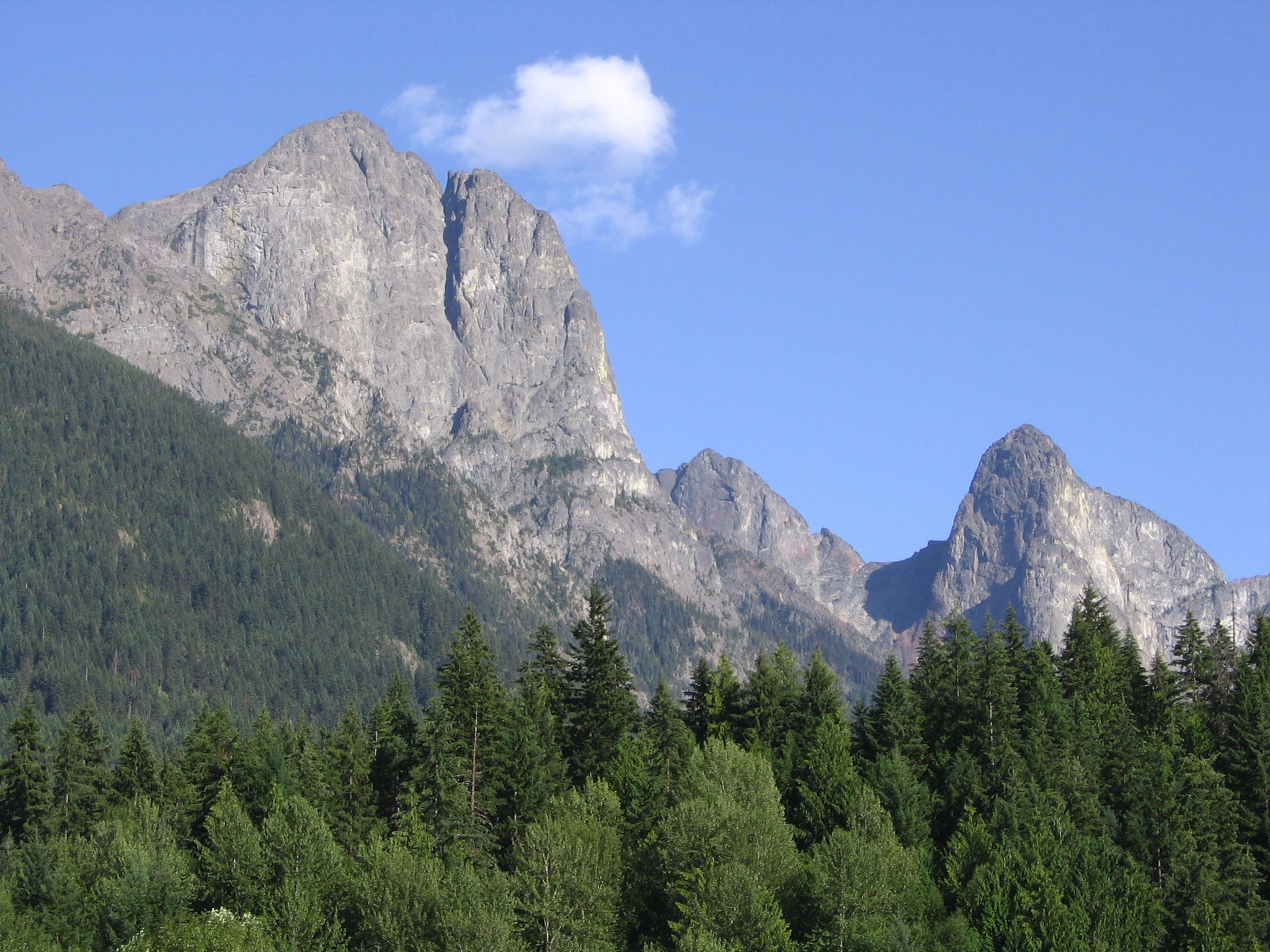 Hozomeen Mountain